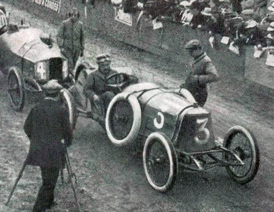 Jean Porporato, vainqueur de la Coupe de la Sarthe en 1913 (coupe cette année-là pour voitures de moins de 3 Litre) - La Vie au Grand Air du 16 août 1913, p.672